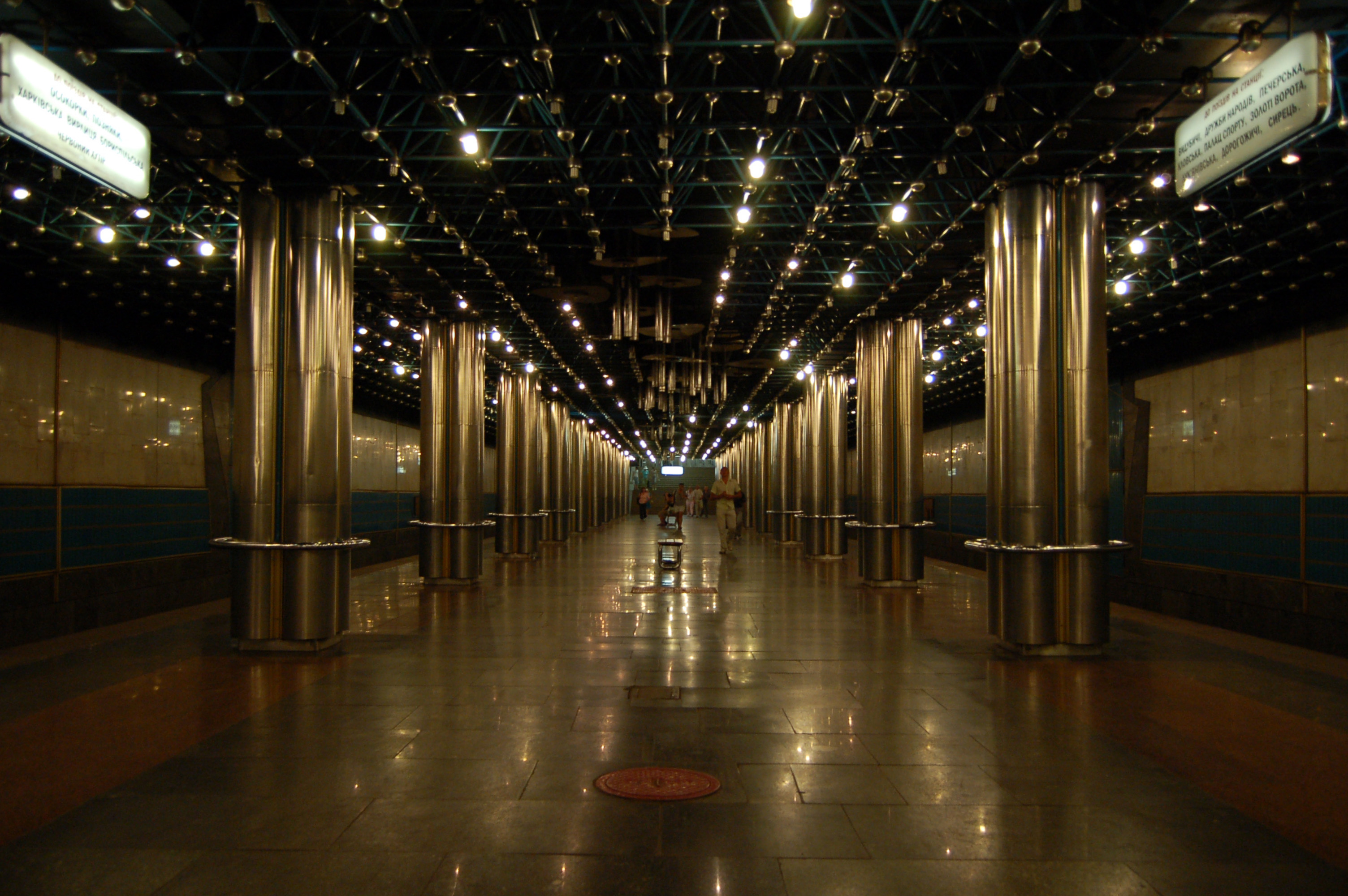 Cтанция метро «Славутич», центральный зал